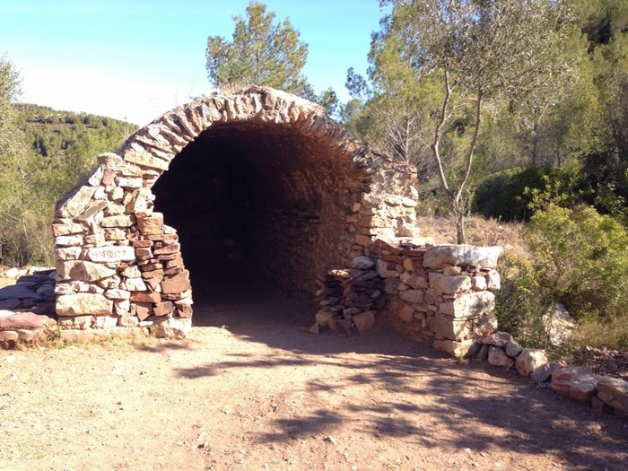 El Maset